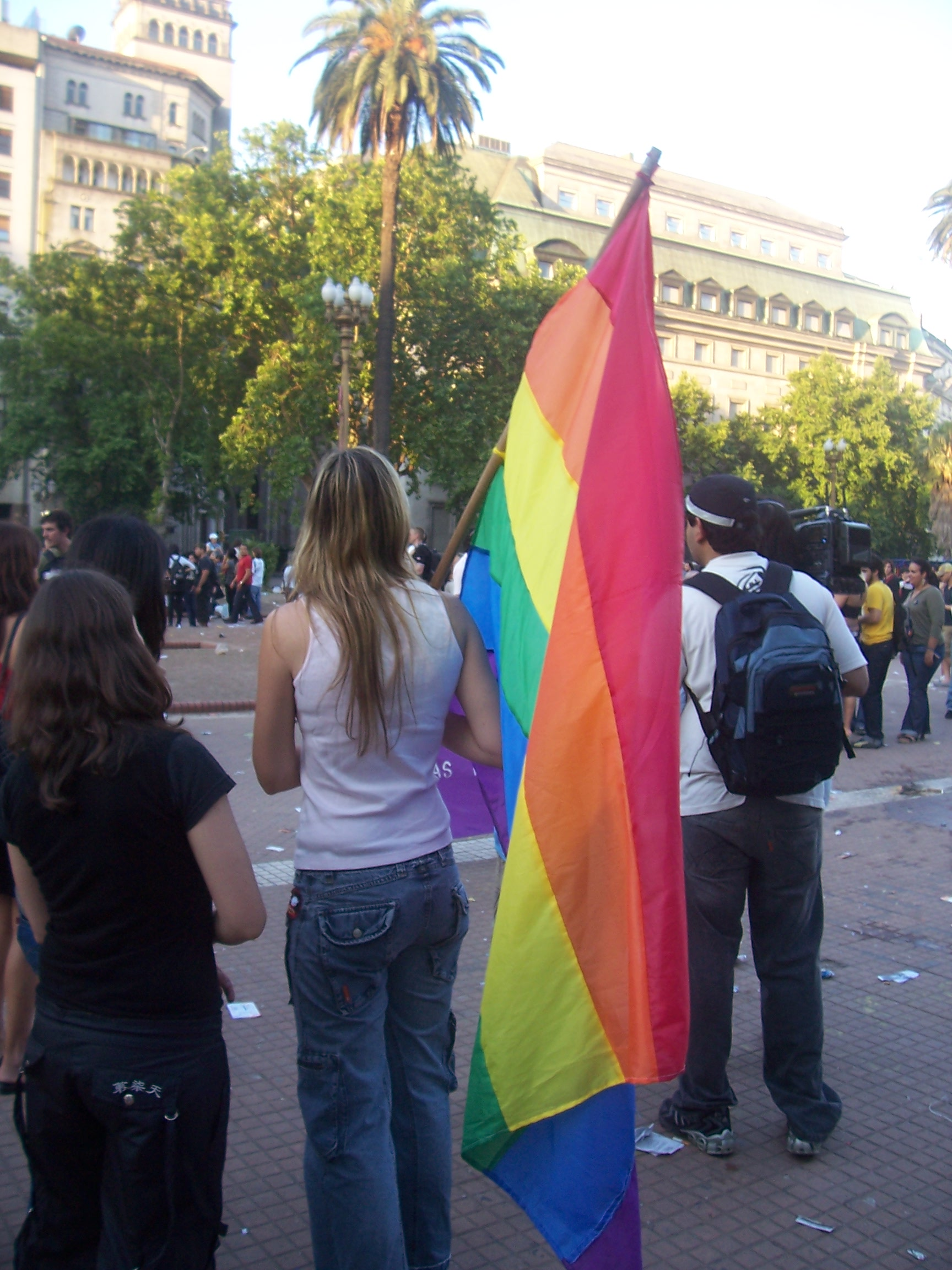 Gay Parade 2007